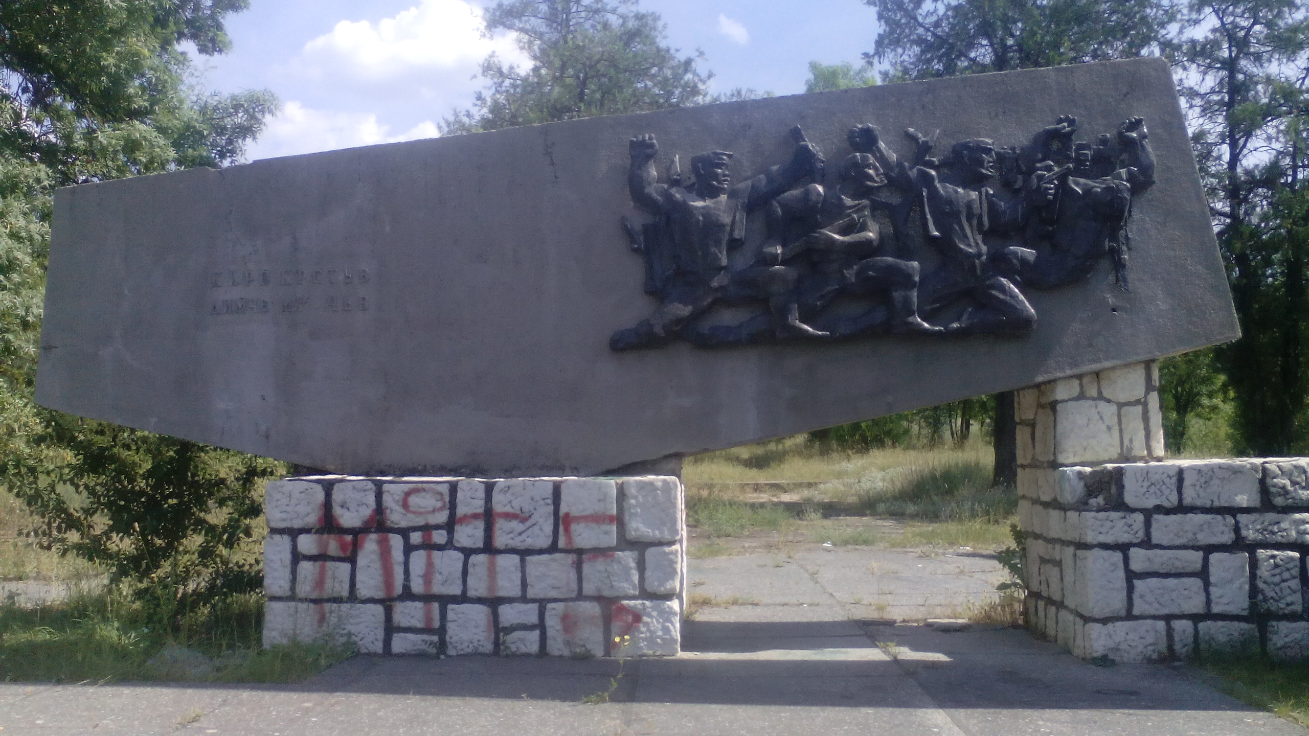 Споменик на местото на загинување на Киро Крстев и Димче Мирчев